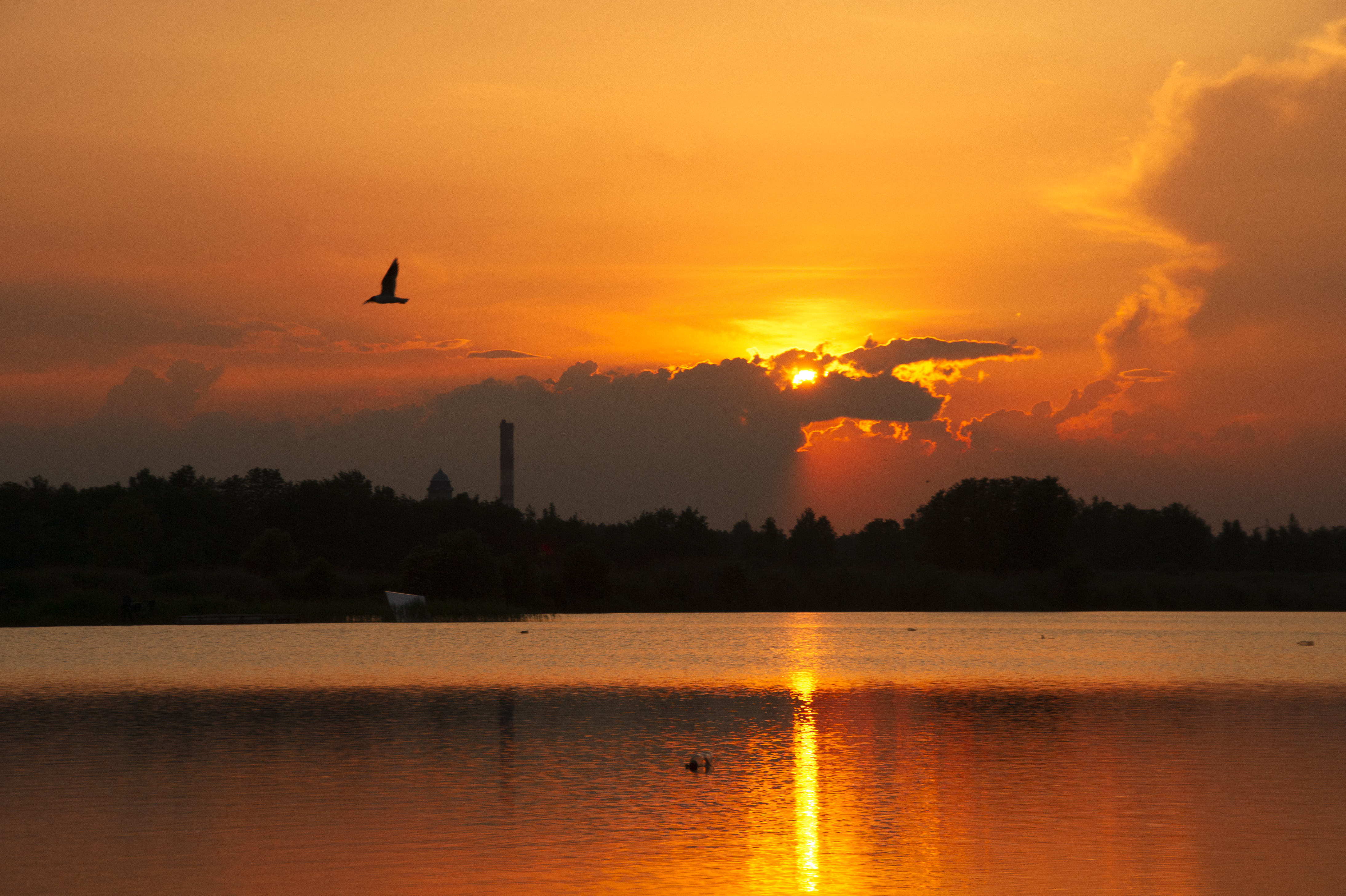 Zachód słońca od strony Mysłowice